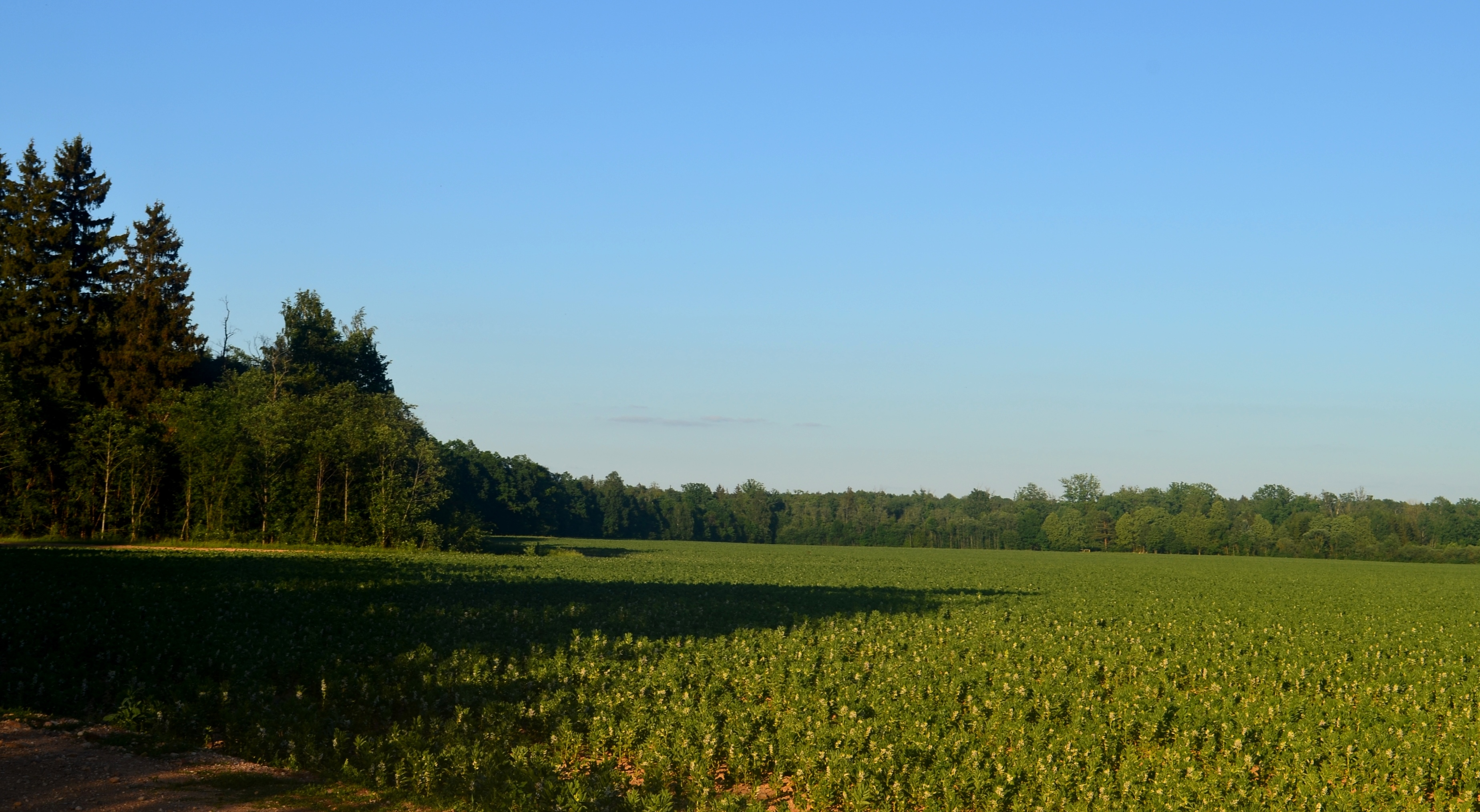 Labūnavos miškas už Sičionių, Kėdainių raj.